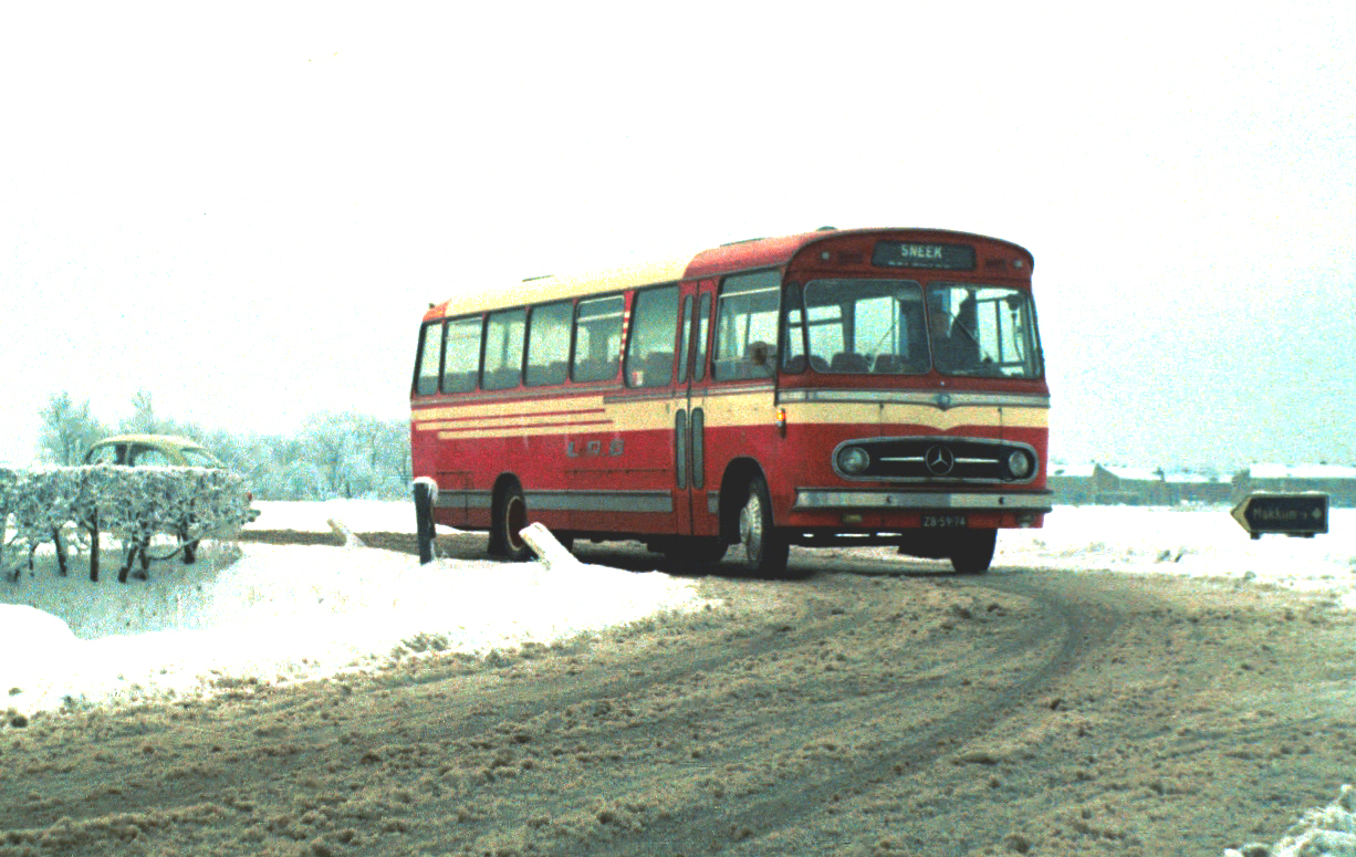 Leeuwarder Auto Bedrijf (LAB) bus 2, Hainje van het Mercedes Benz type LP 1113/57 naar Sneek bij Makkum. Deze bus werd later LABO: 509 en Fram: 509.